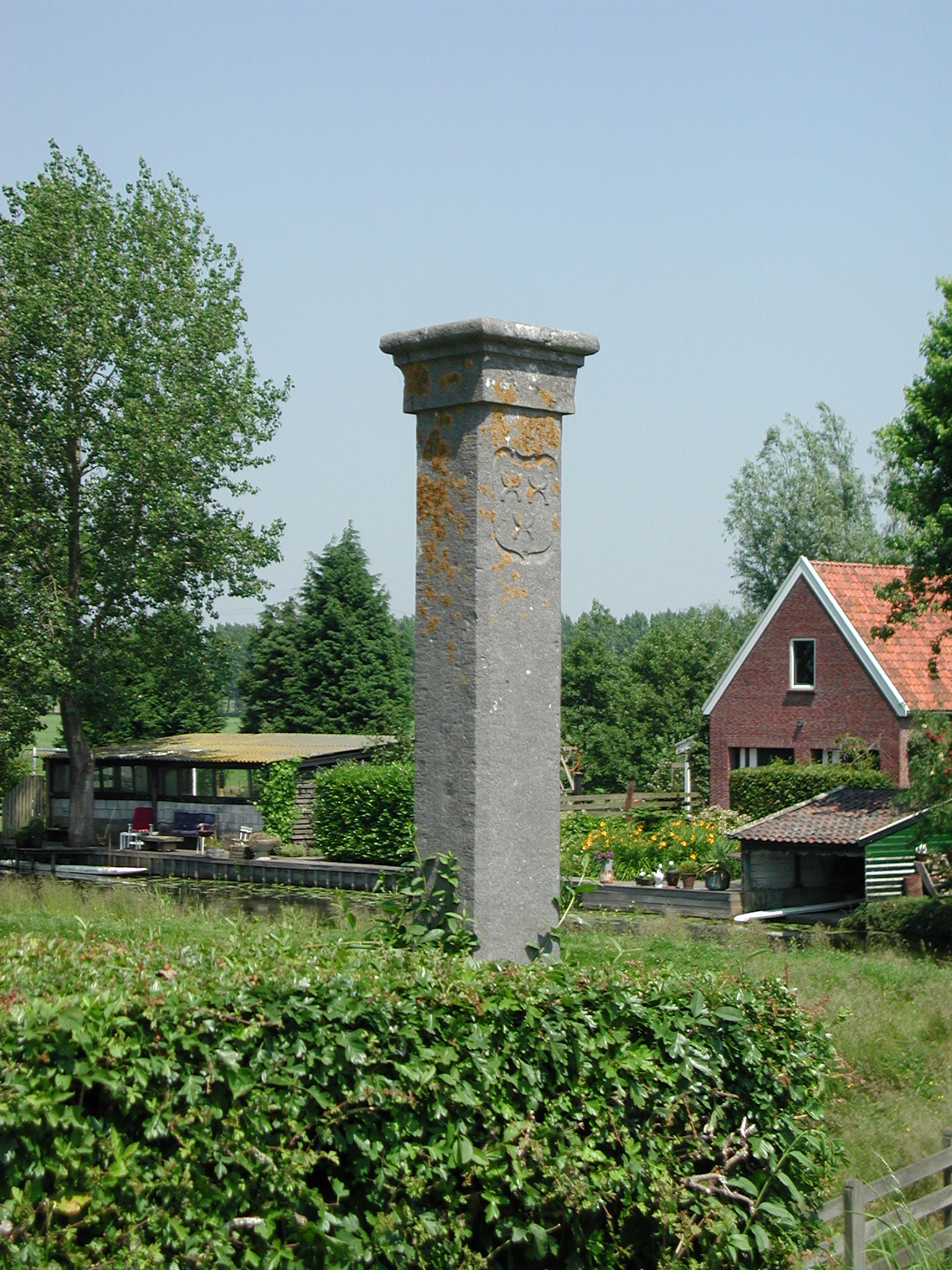 Banpaal te Hekendorp. Auteur P.H.Louw, vrij voor gebruik, foto 2005